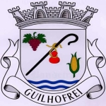 Brasão Guilhofrei